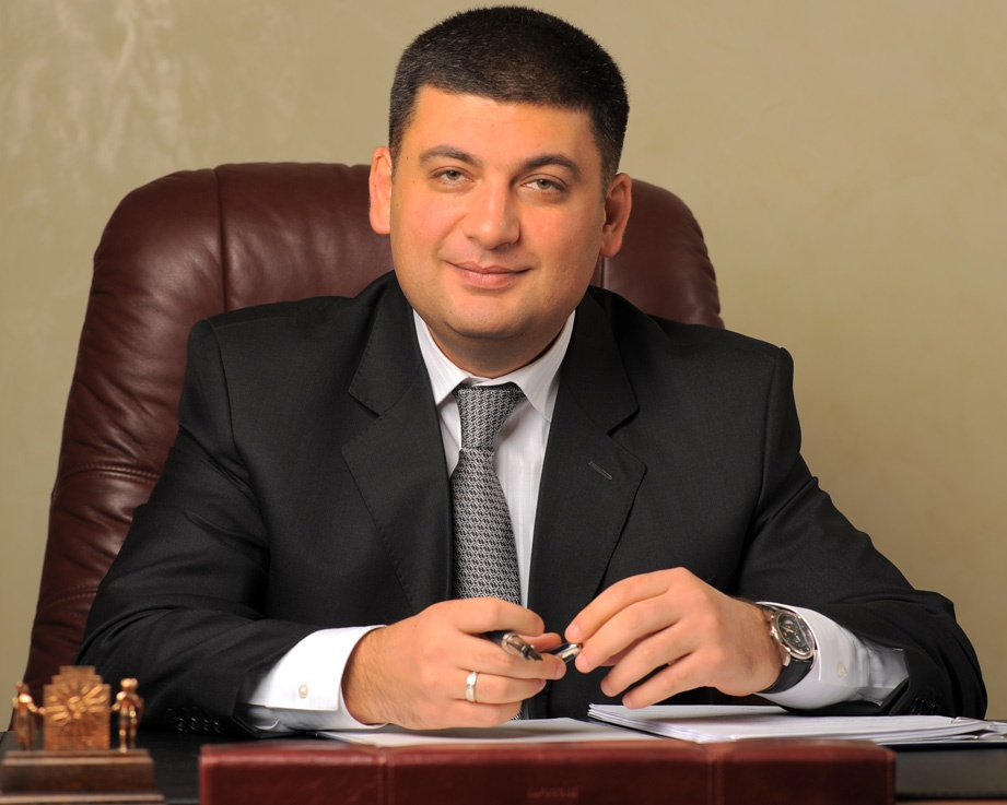 Владимир Гройсман